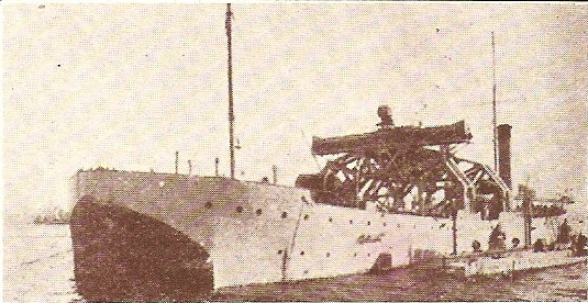 German U-boat salvage tug Vulkan